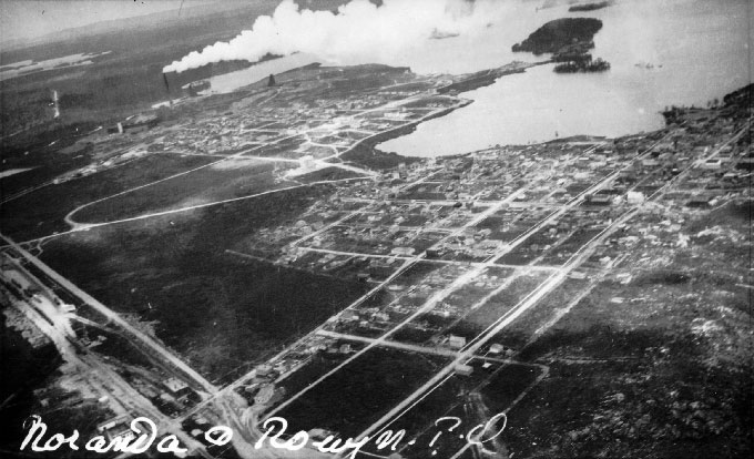 Vue aérienne de Rouyn et de Noranda en 1929